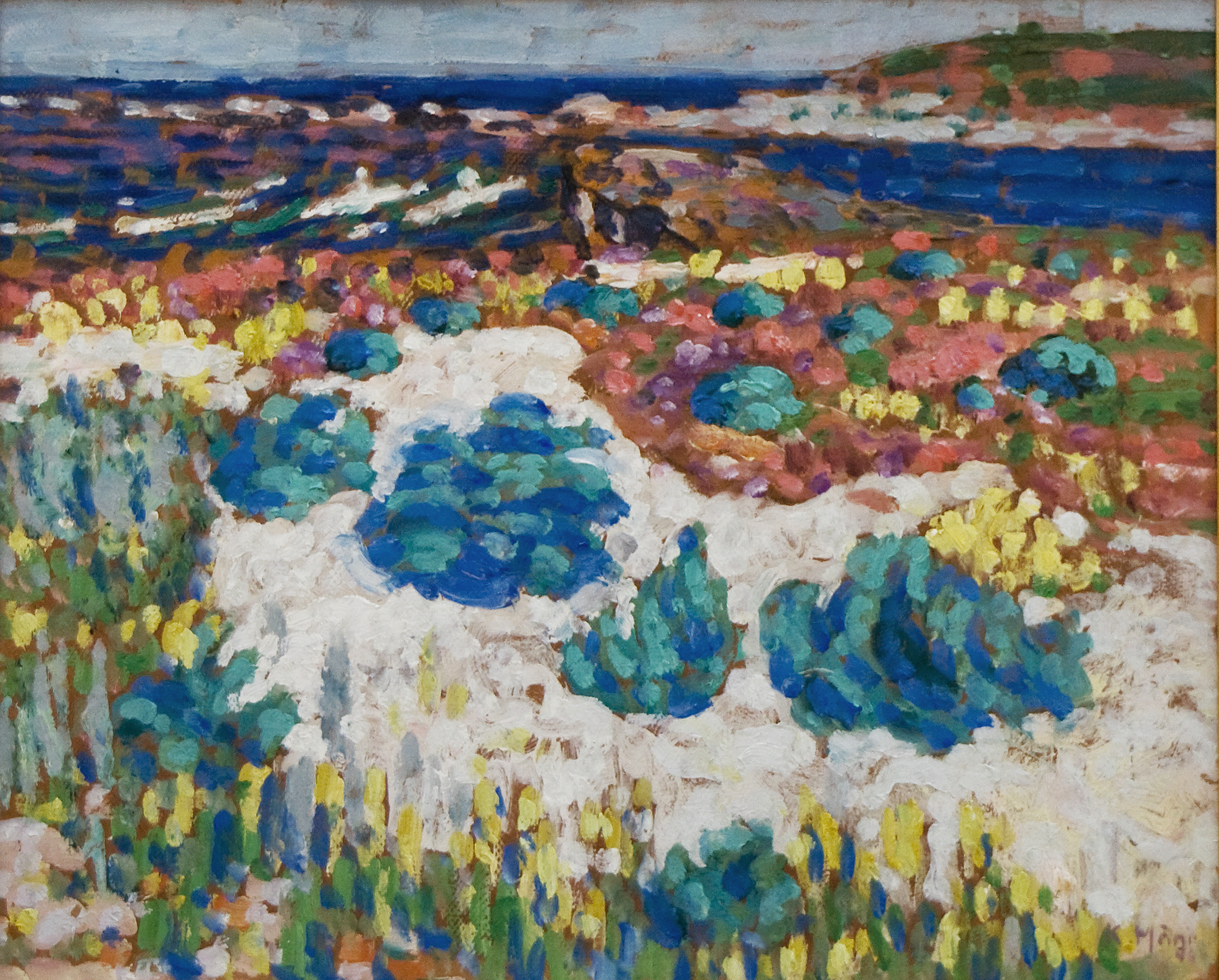 "Saaremaa. Etüüd." (ka "Rannamaastik") Konrad Mägi